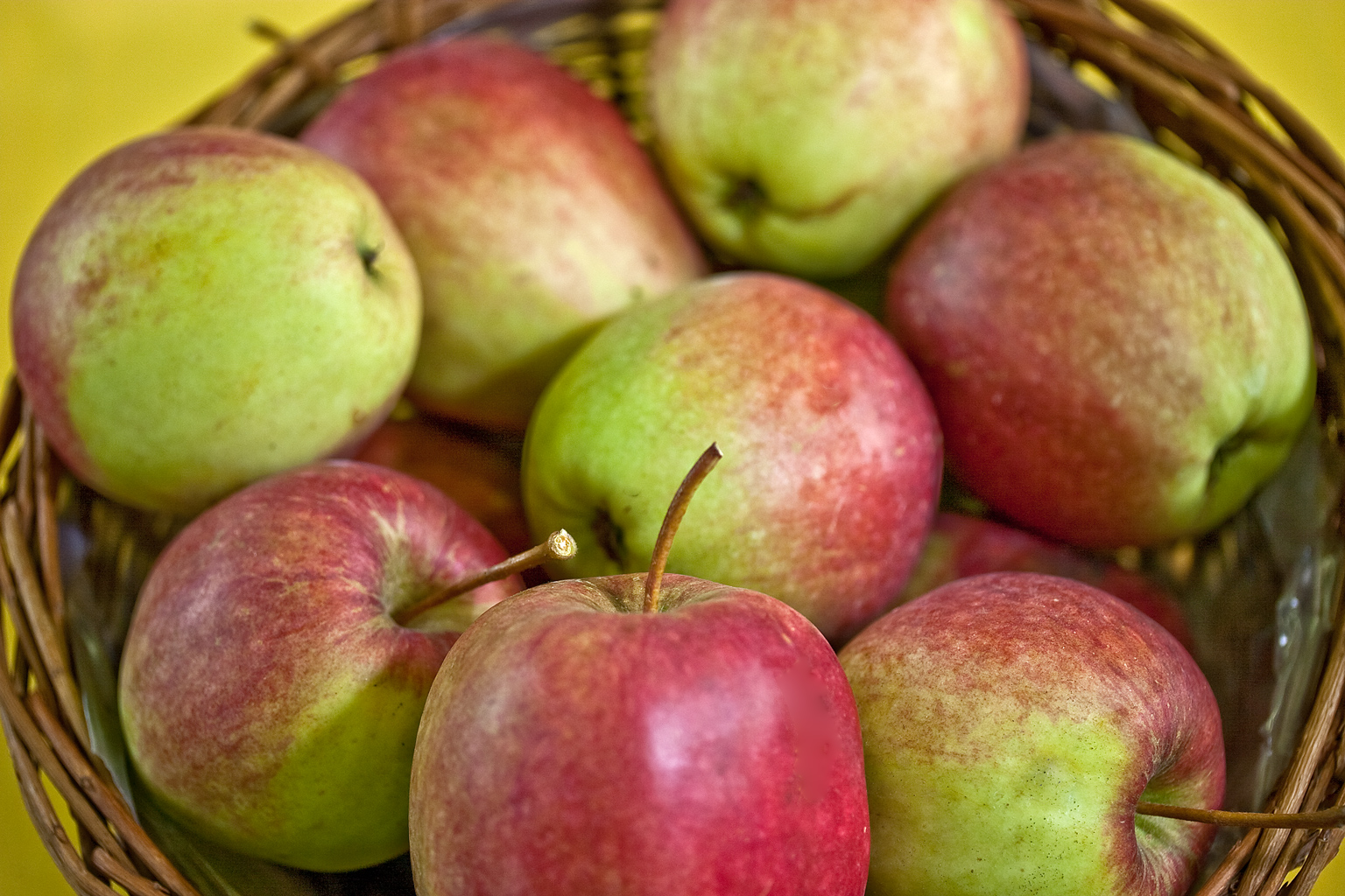 Der Rewena ist eine Apfelsorte